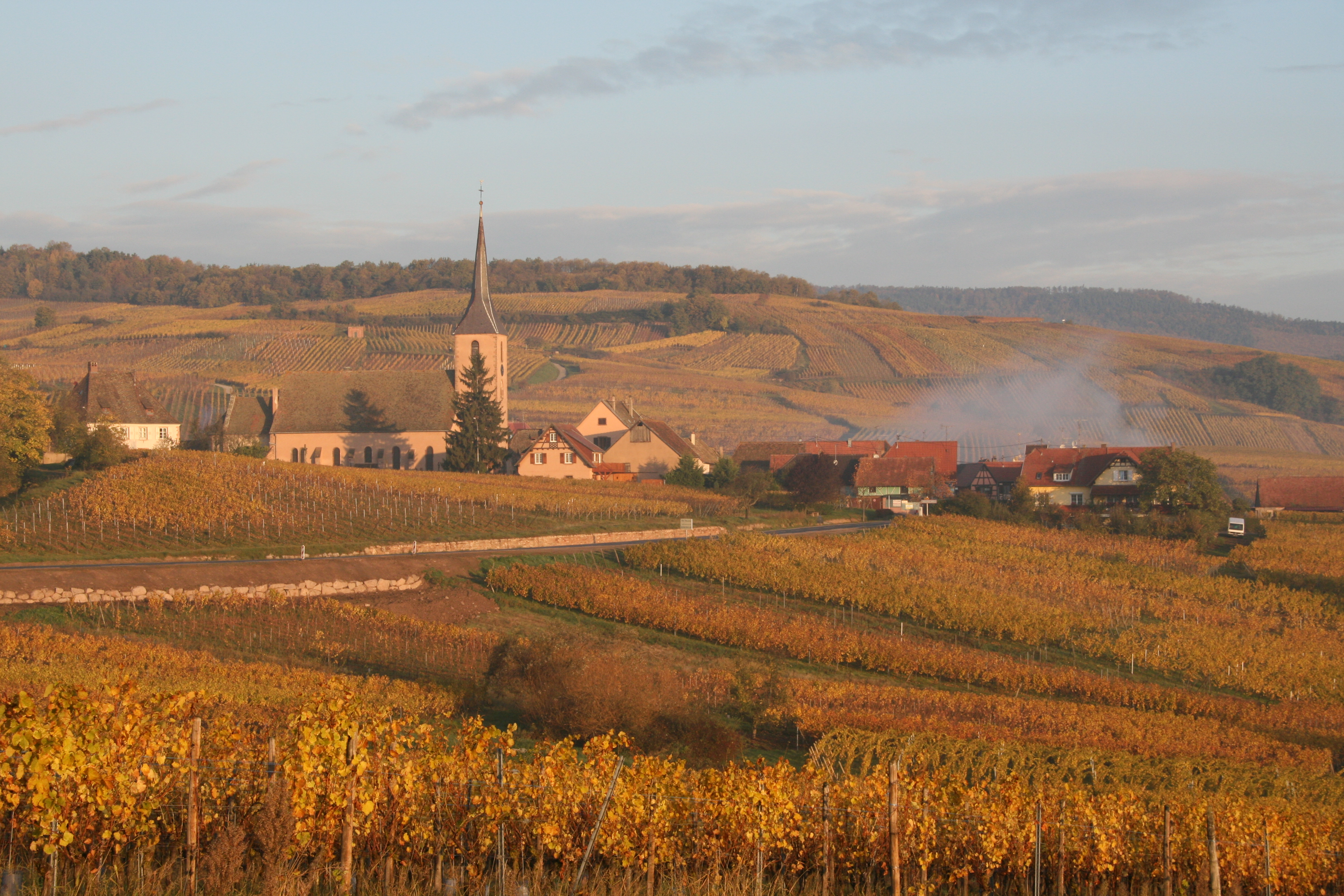 Vue générale de Blienschwiller (Alsace) et du grand cru Winzenberg (juste derrière le village) depuis le Heerweg.